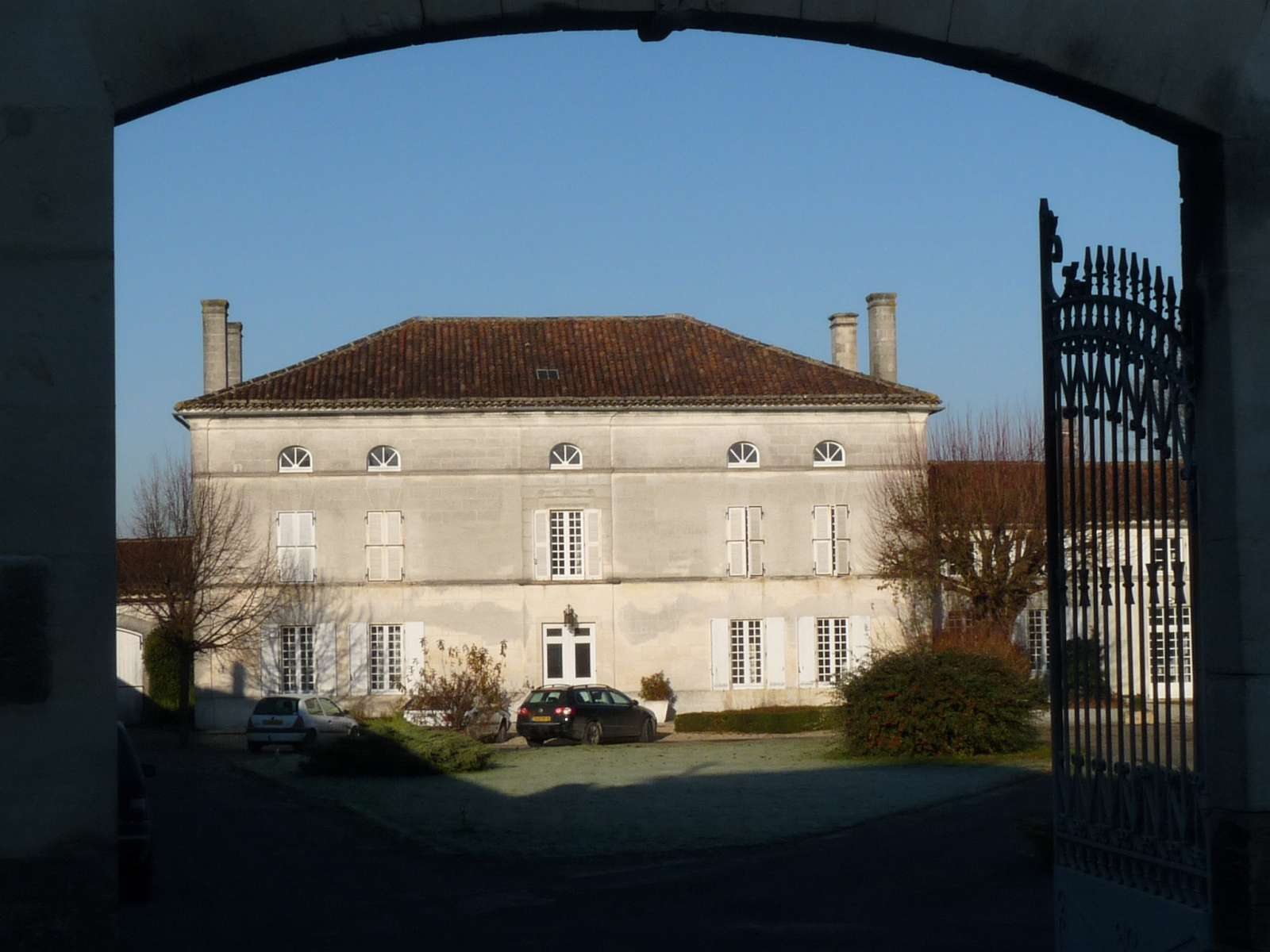 logis d'Angeac, Angeac-Champagne, Charente, France